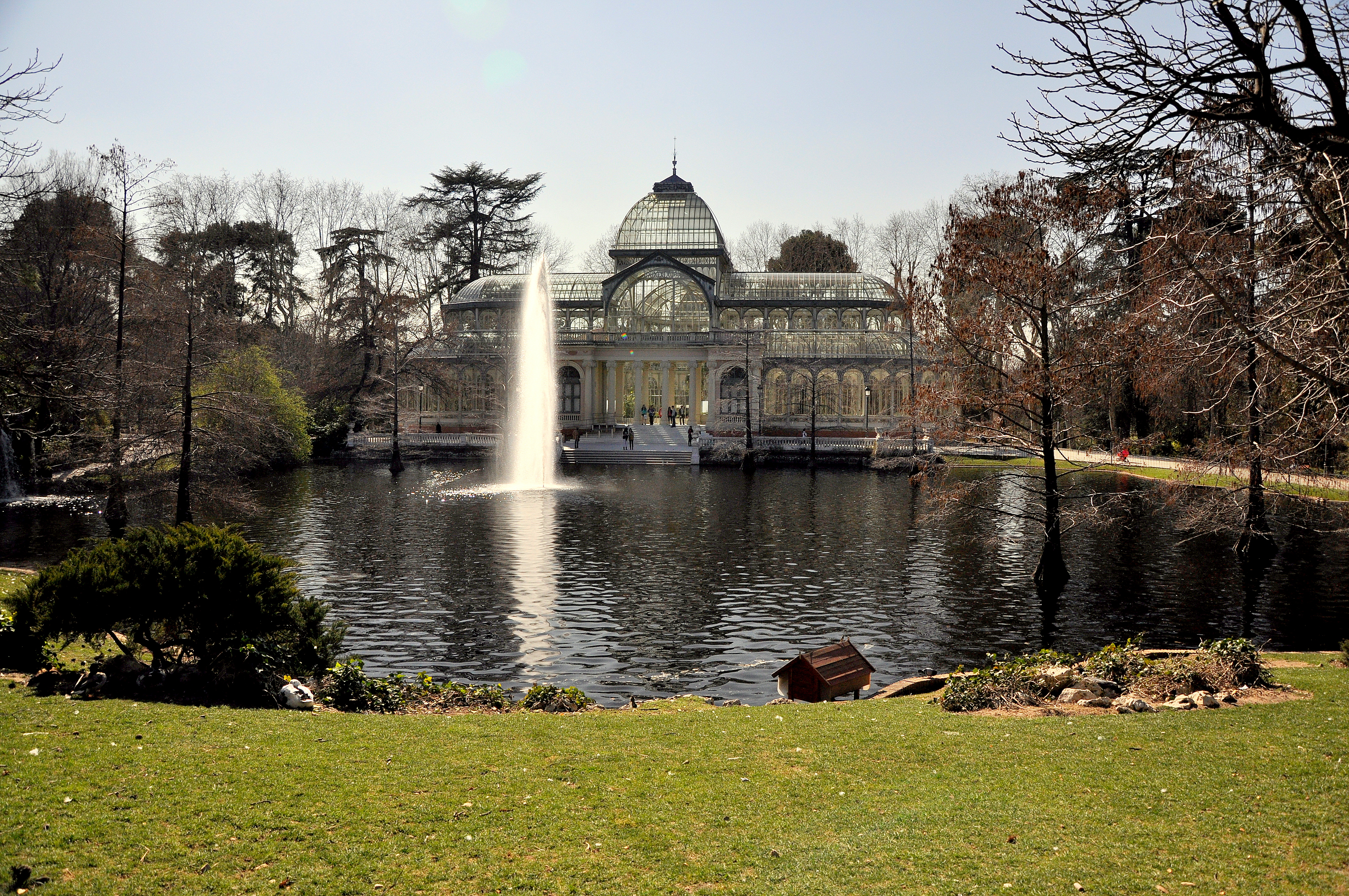 Het palacio de Cristal in het Buen Retiro Park in Madrid, Spanje